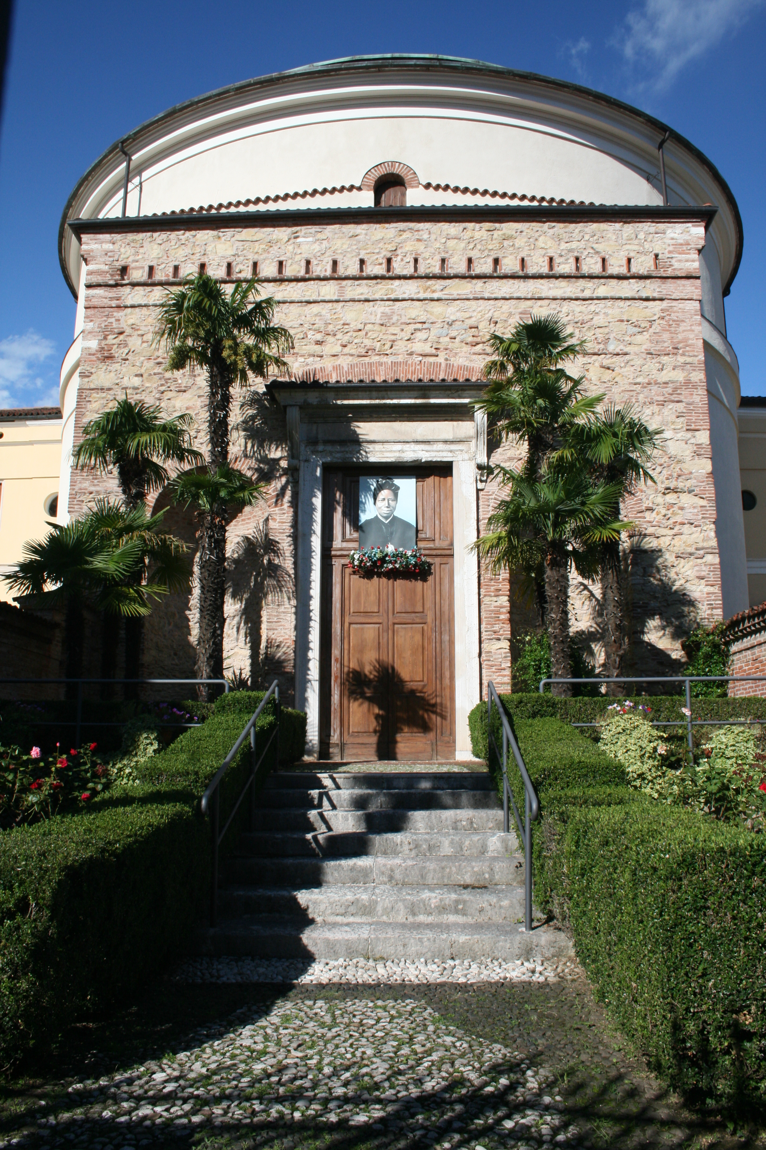 Chiesa della Sacra Famiglia a Schio